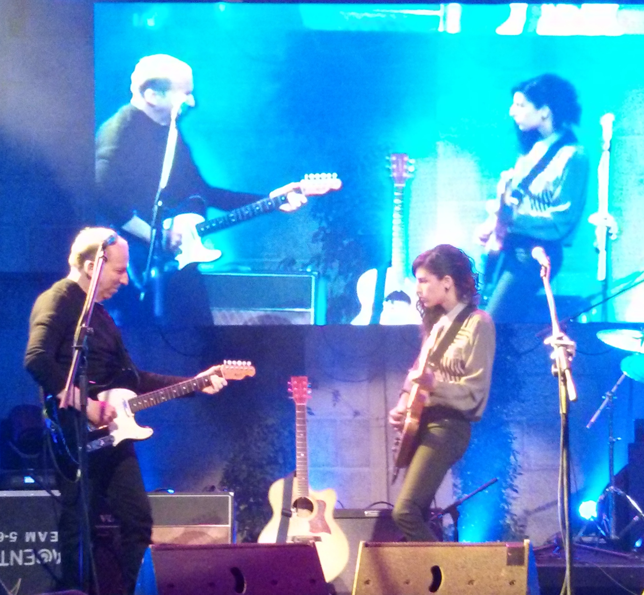 תמר אייזנמן מארחת את דני סנדרסון, בית אביחי, ירושלים, 20/5/2014